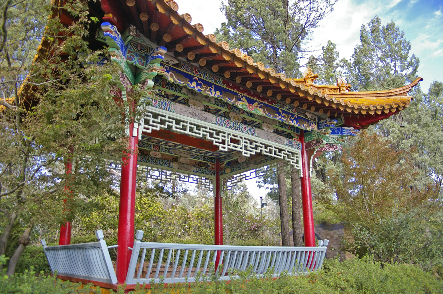 Chinese Pavilion. Wagga Wagga Botanic Gardens